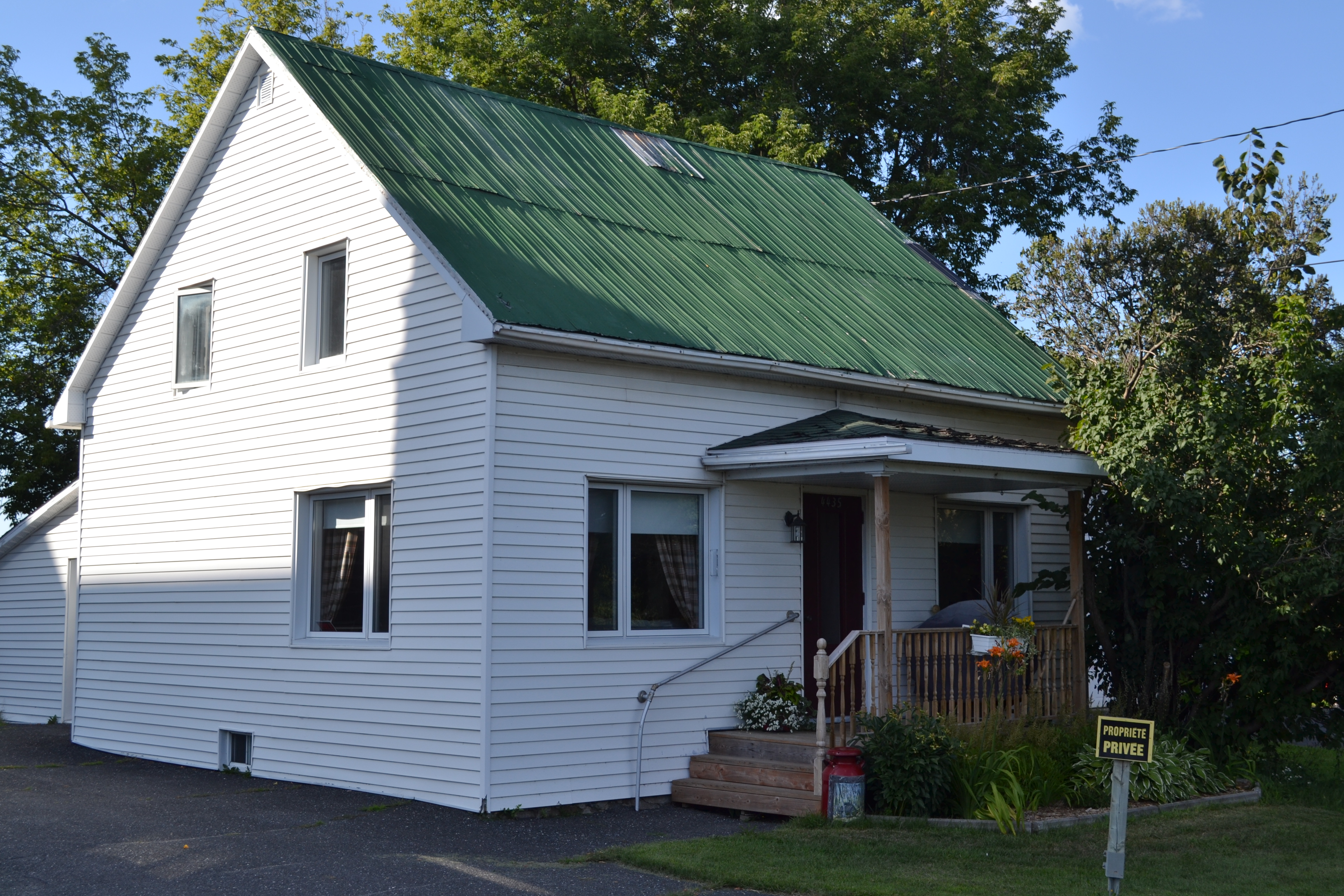 Face avant de la maison du Sacristain à Saint-Cyrille-de-Wendover, Quebec